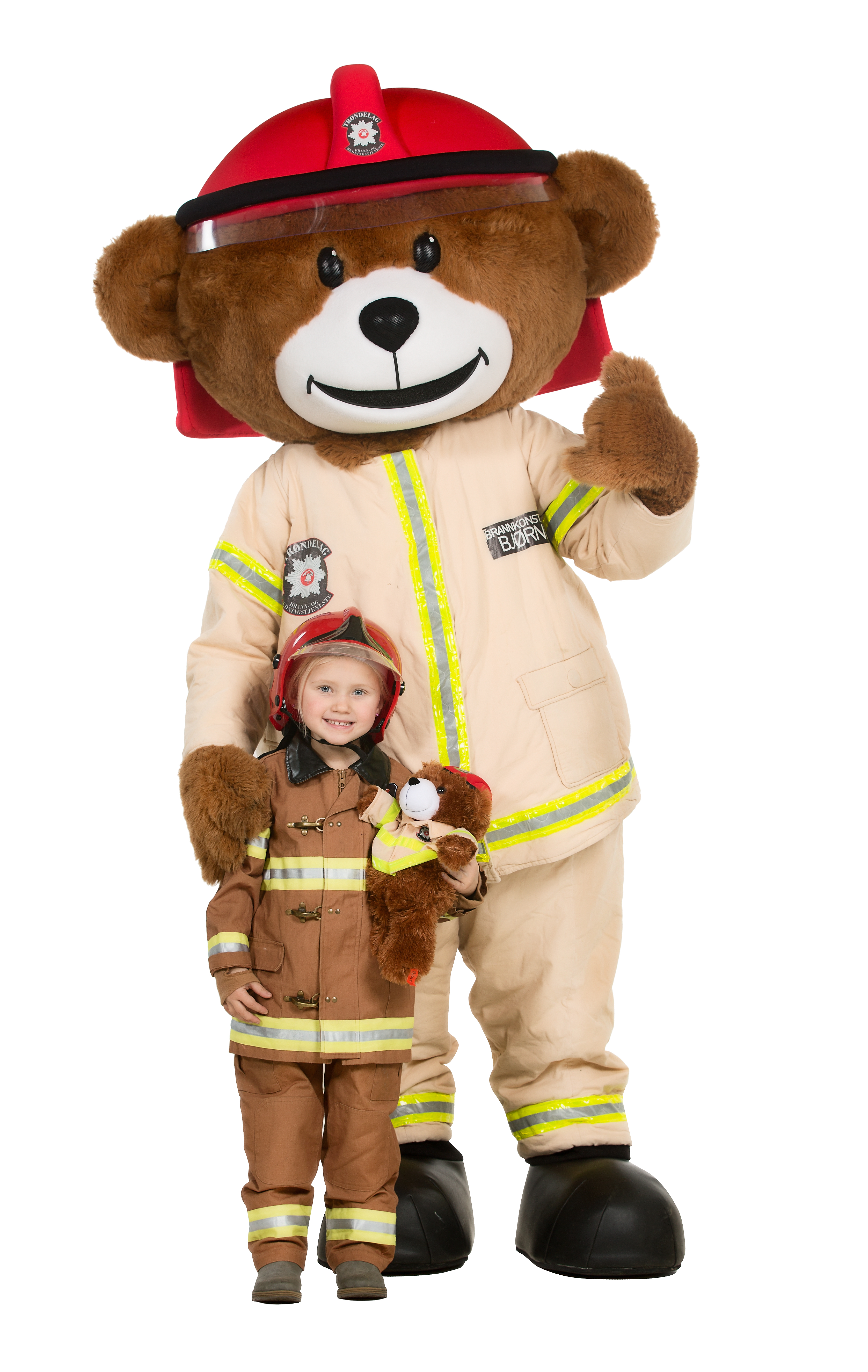 Brannbamsen